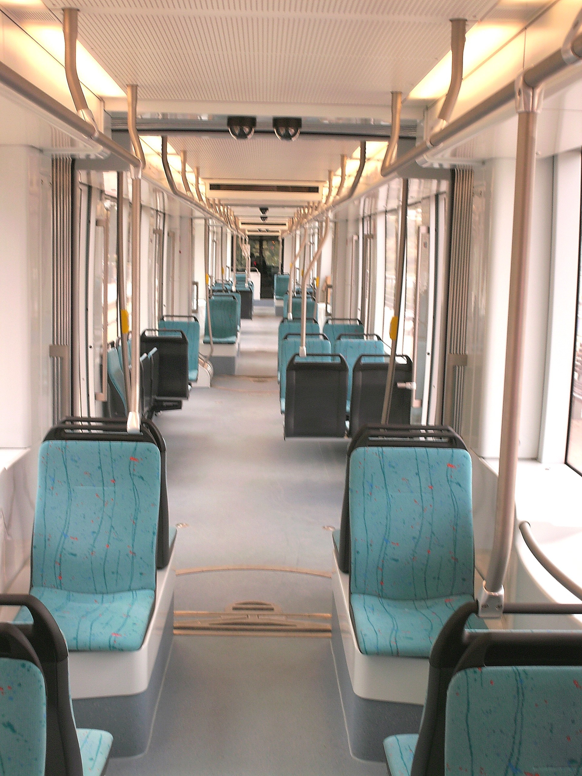 Innenraum eines auf der Linie L4 der Stadtbahn Alicante eingesetzten Straßenbahnwagens vom Typ Flexity Outlook